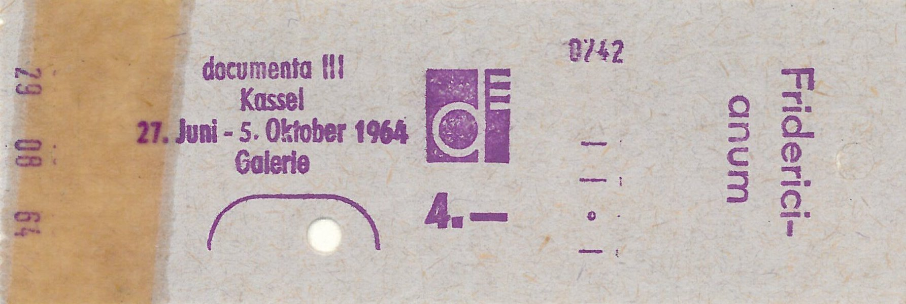 Foto des Tickets / Eintrittskarte der documenta III